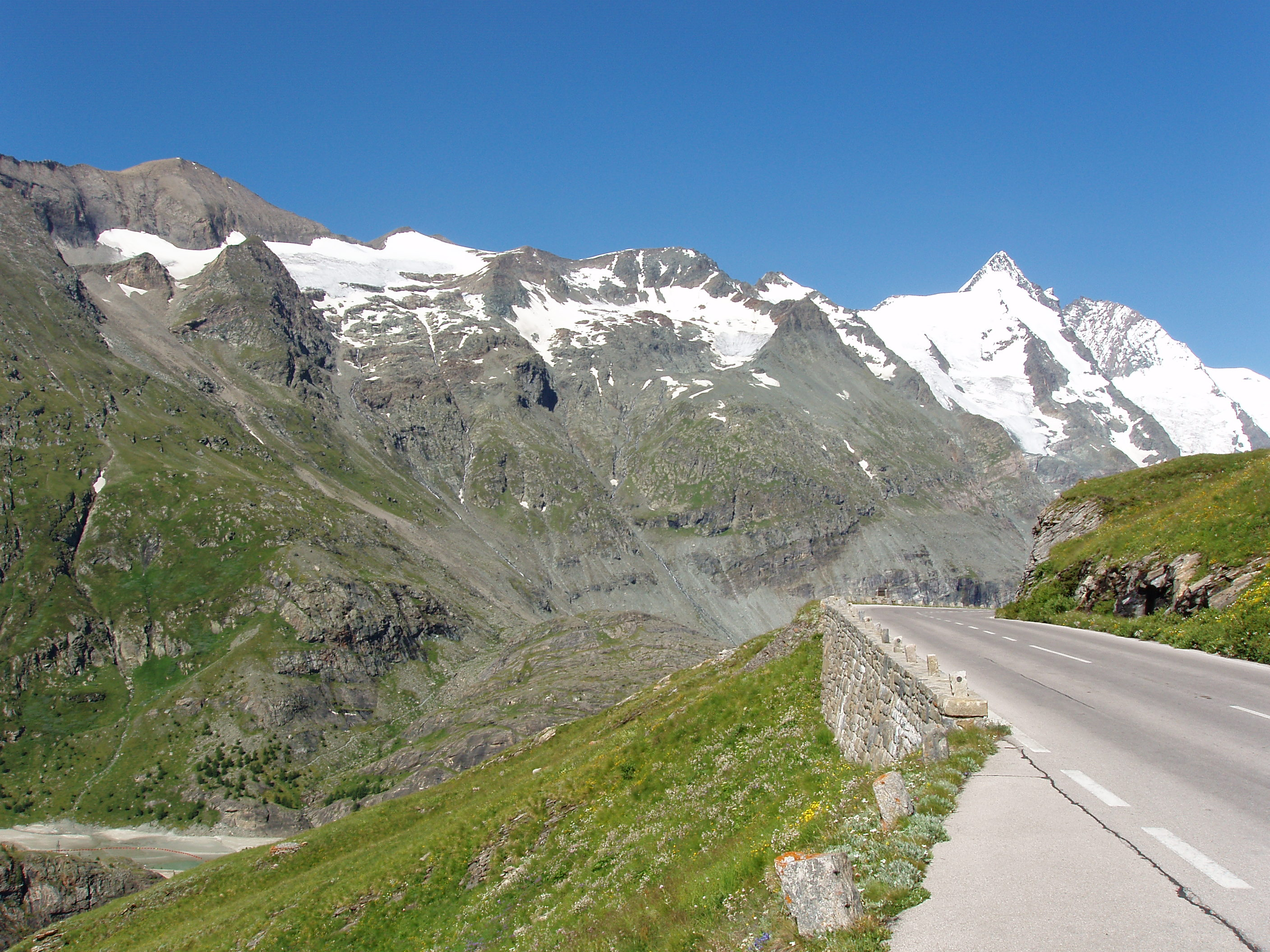 Großglockner-Hochalpenstraße: Blick von Schöneck auf 1953m Richtung Glockner